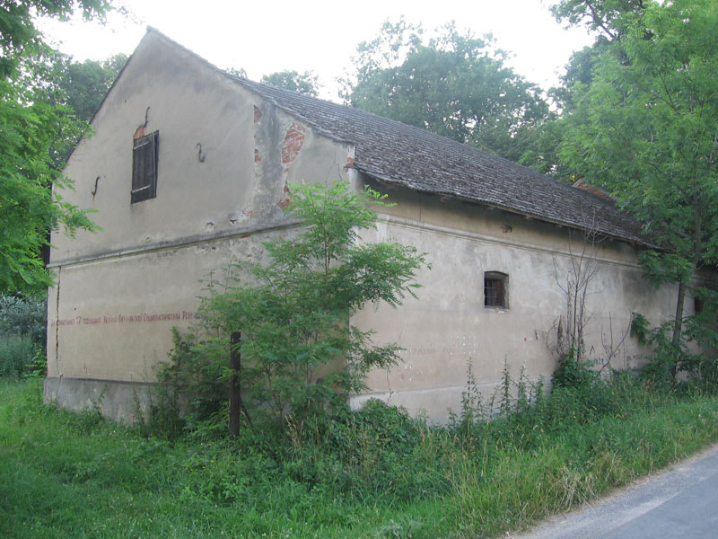 Budynek gospodarczy przy dawnym dworze w Glinach Małych (gm. Borowa, pow. Mielec) Napis po rosyjsku:Niech żyje 27. rocznica Wielkiej Październikowej Socjalistycznej Rewolucji!